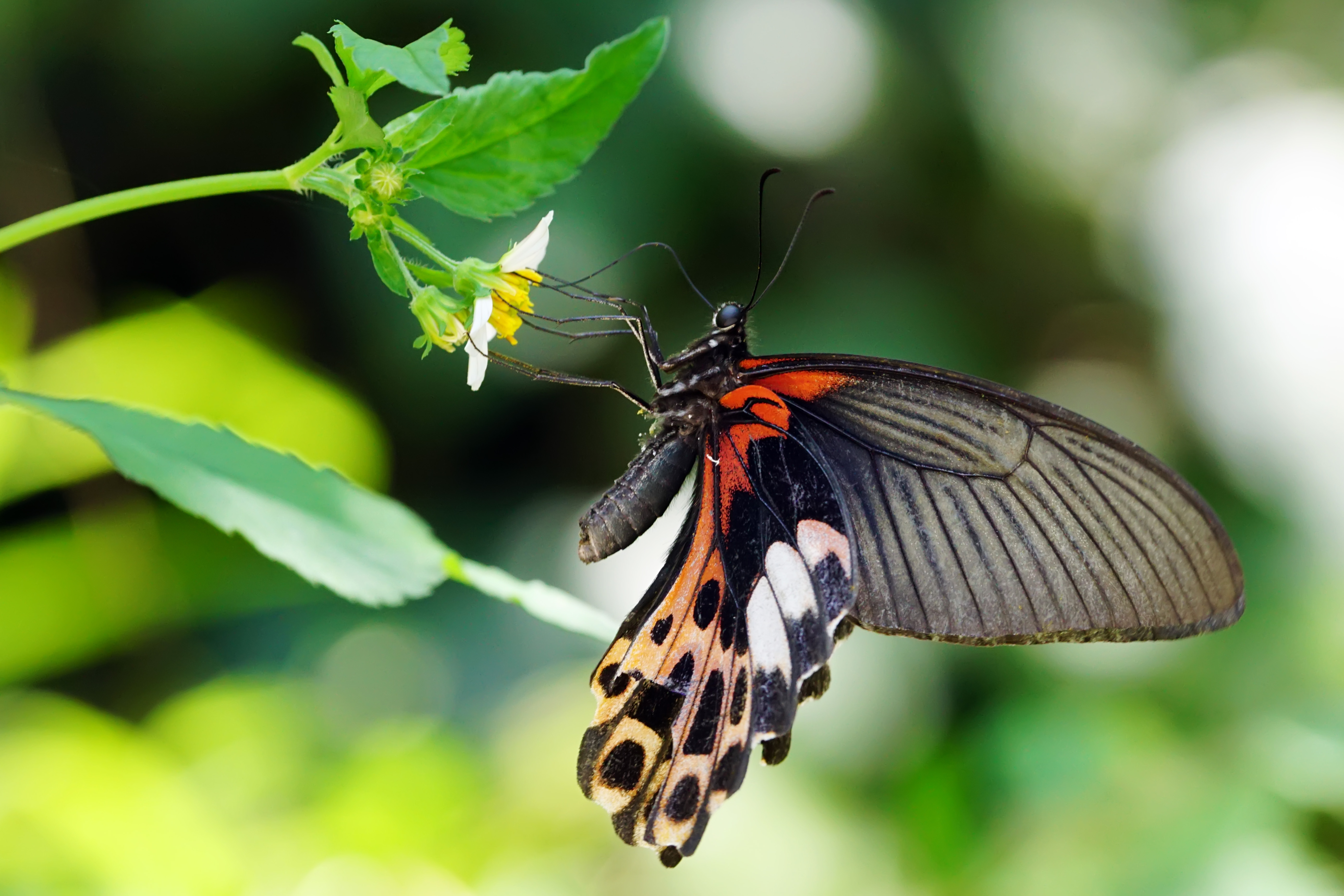 台灣鳳蝶 Papilio thaiwanus